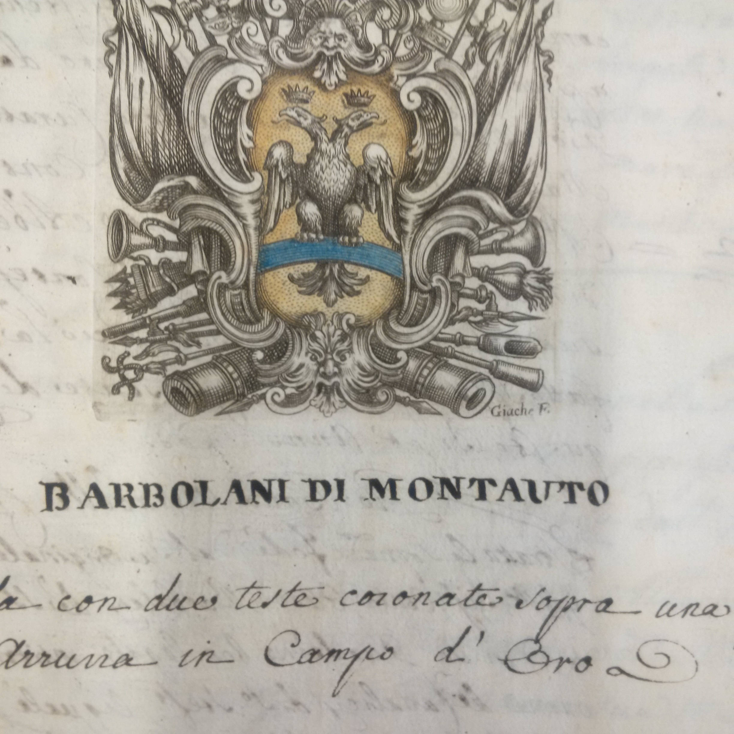 Disegno presente in archivio di Stato Firenze, raccolta Sebregondi